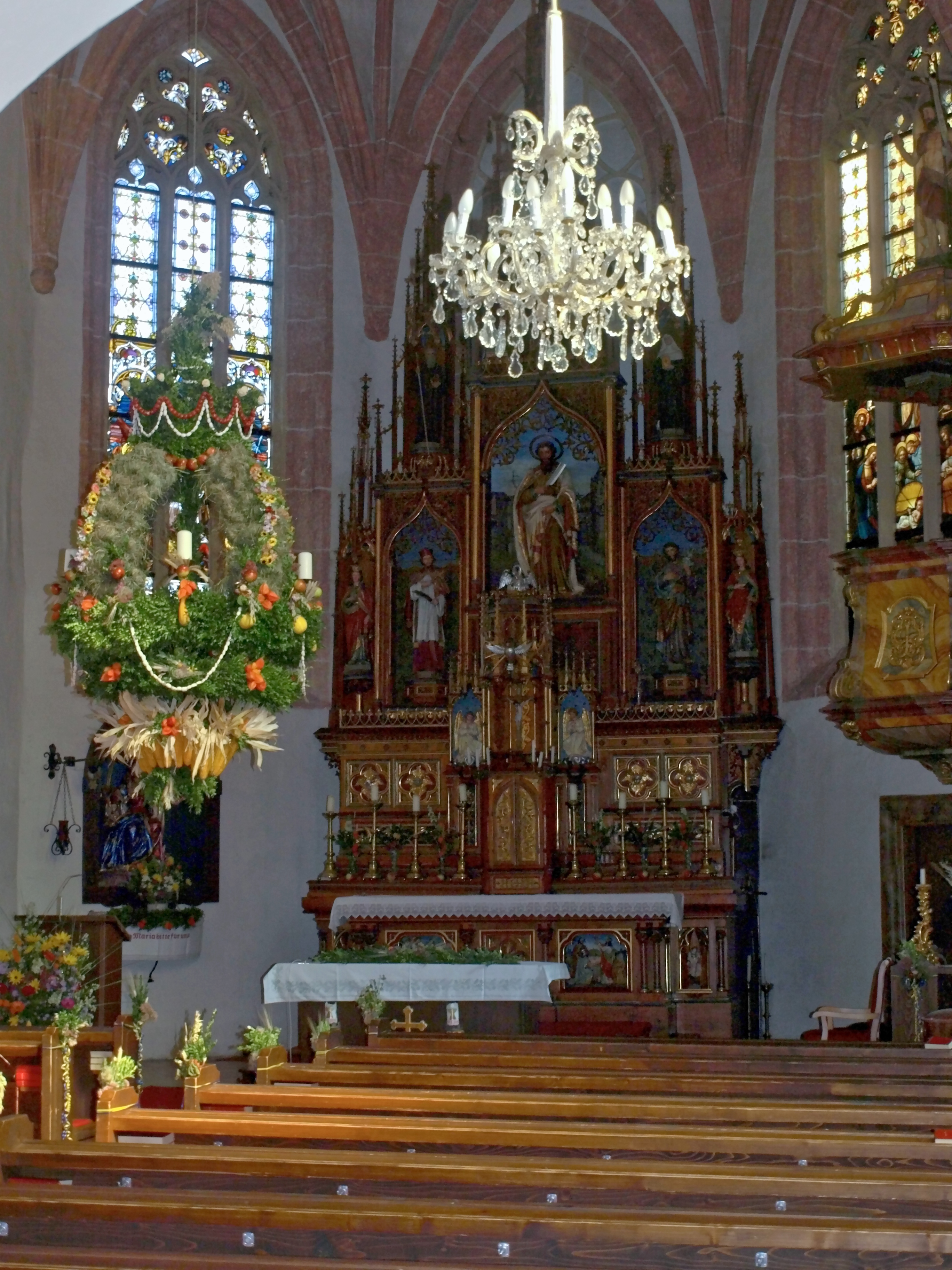 Kath. Pfarrkirche hl. Bartholomäus und Friedhof